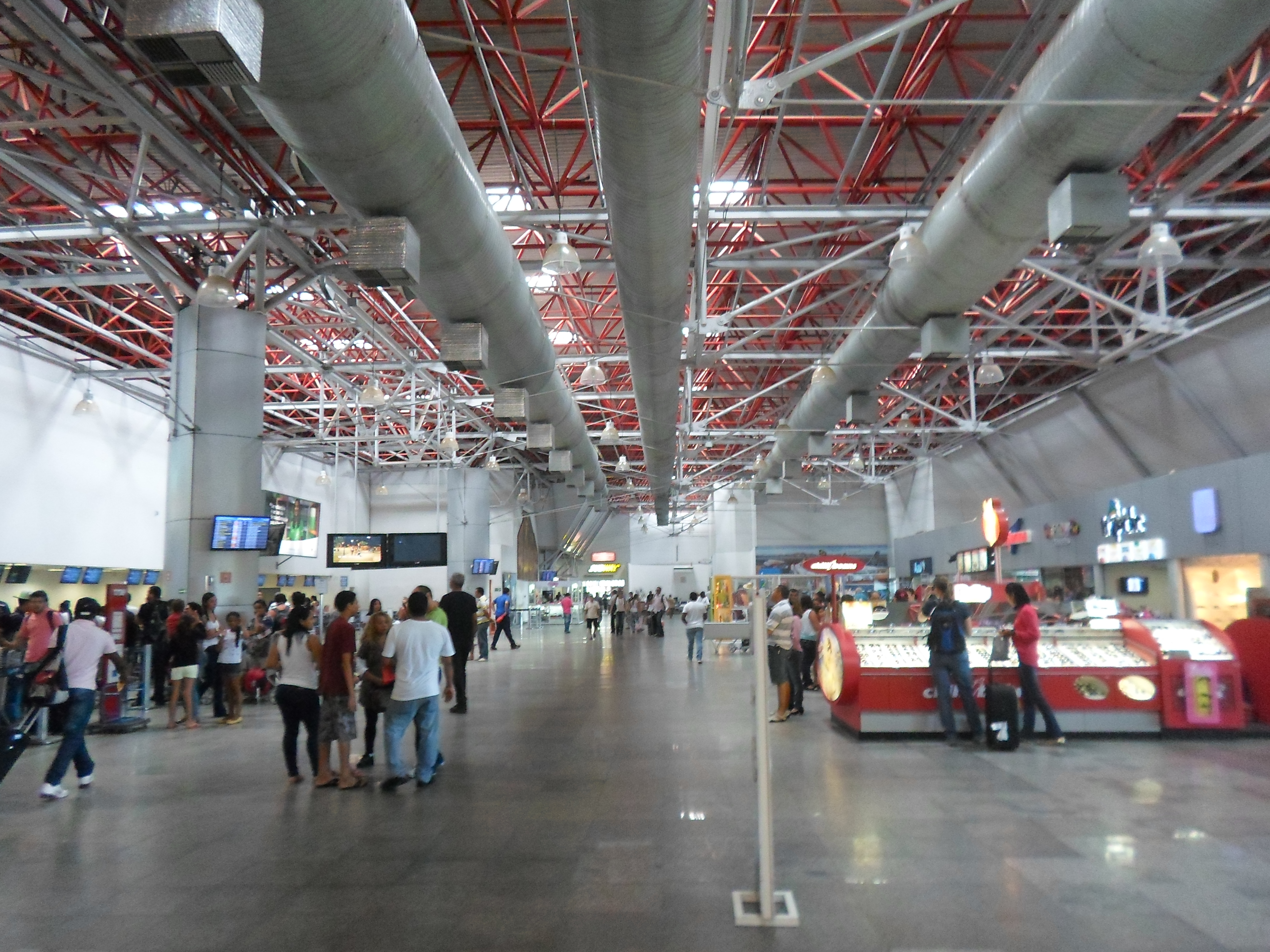 Interior do Aeroporto Internacional de São Luís em janeiro de 2014, após as reformas.